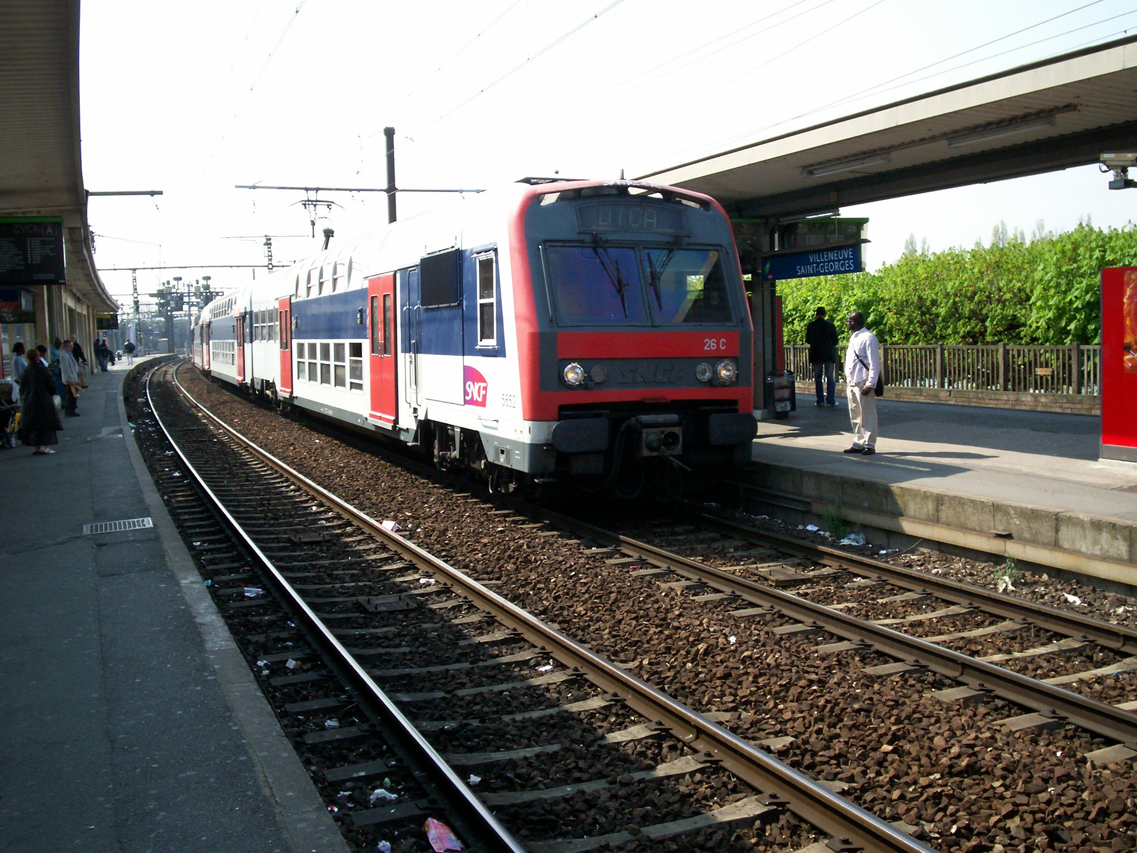 Gare de Villeneuve-Saint-Georges